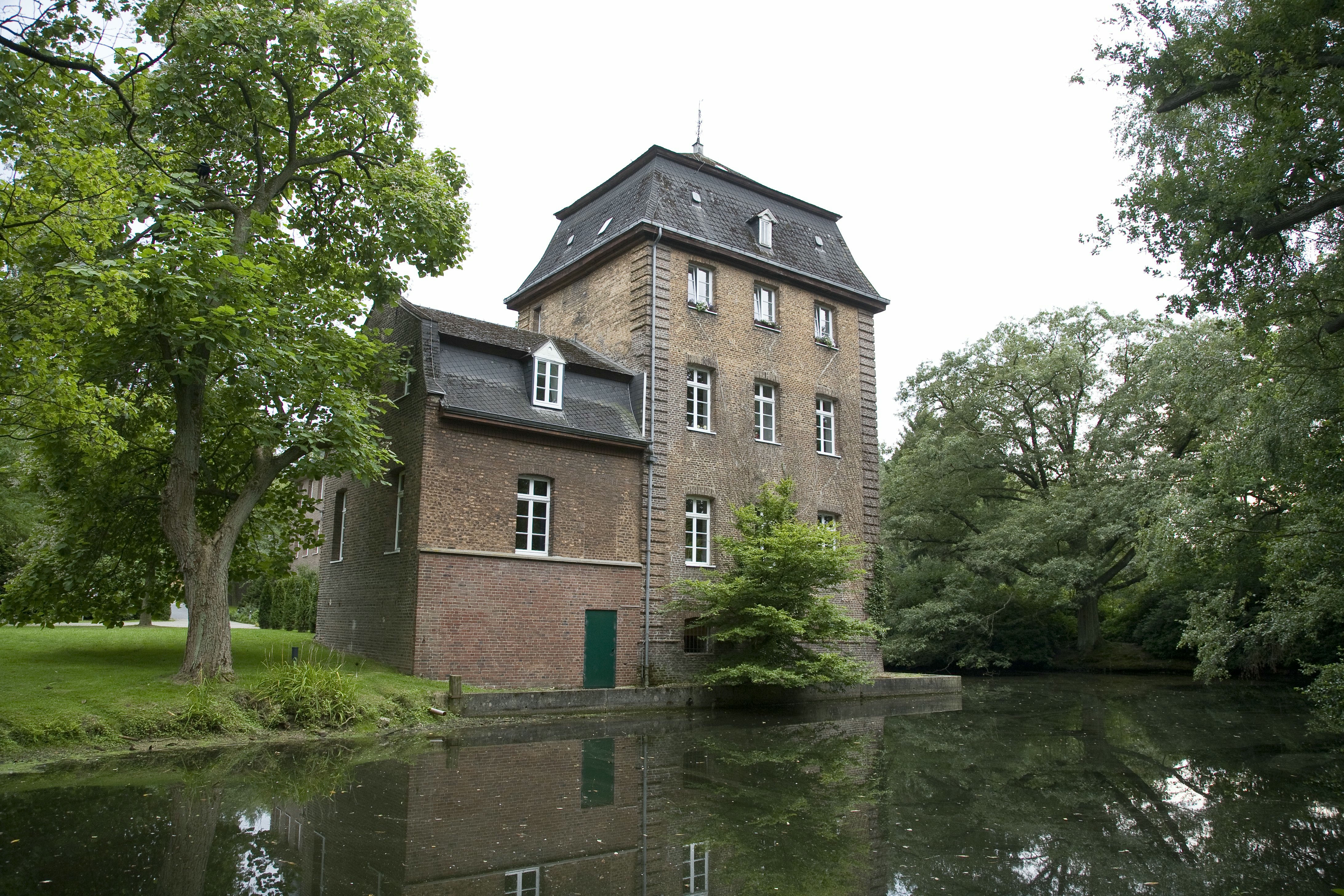 Schloss Dilborn: Zicht op slot omgeven door gracht (opmerking: Publicatie: TRAP Brüggen, een cultuurhistorische fietstocht)